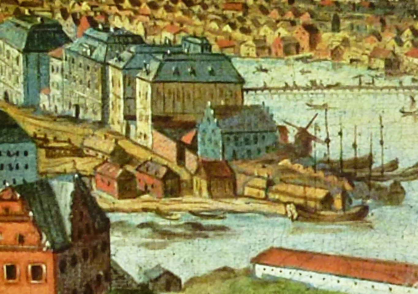 Holmkvarnen på en oljemålning som en okänd målare gjorde kring 1700